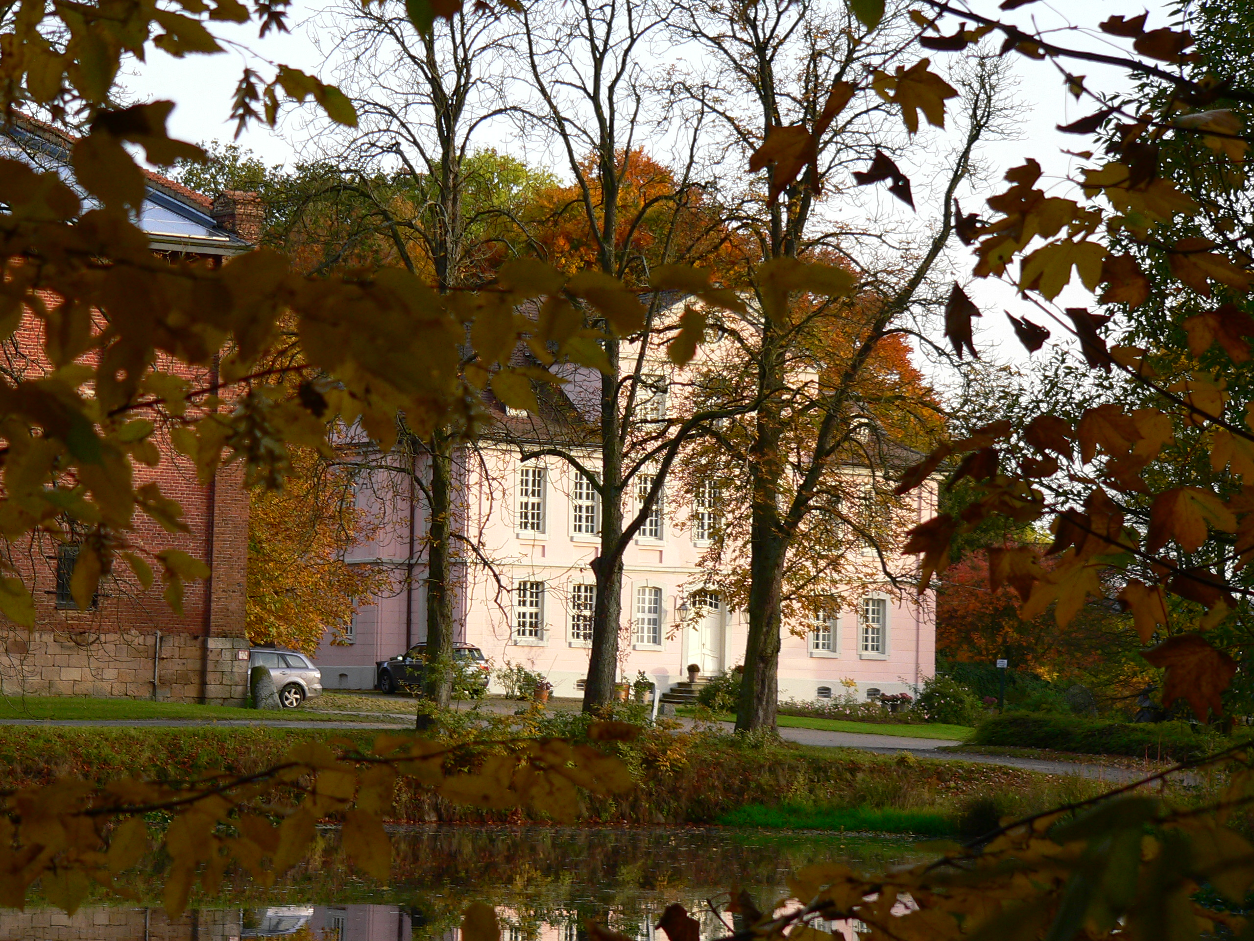 Schloss Windhausen in Niestetal- Heiligenrode im Landkreis Kassel, Hessen, Deutschland